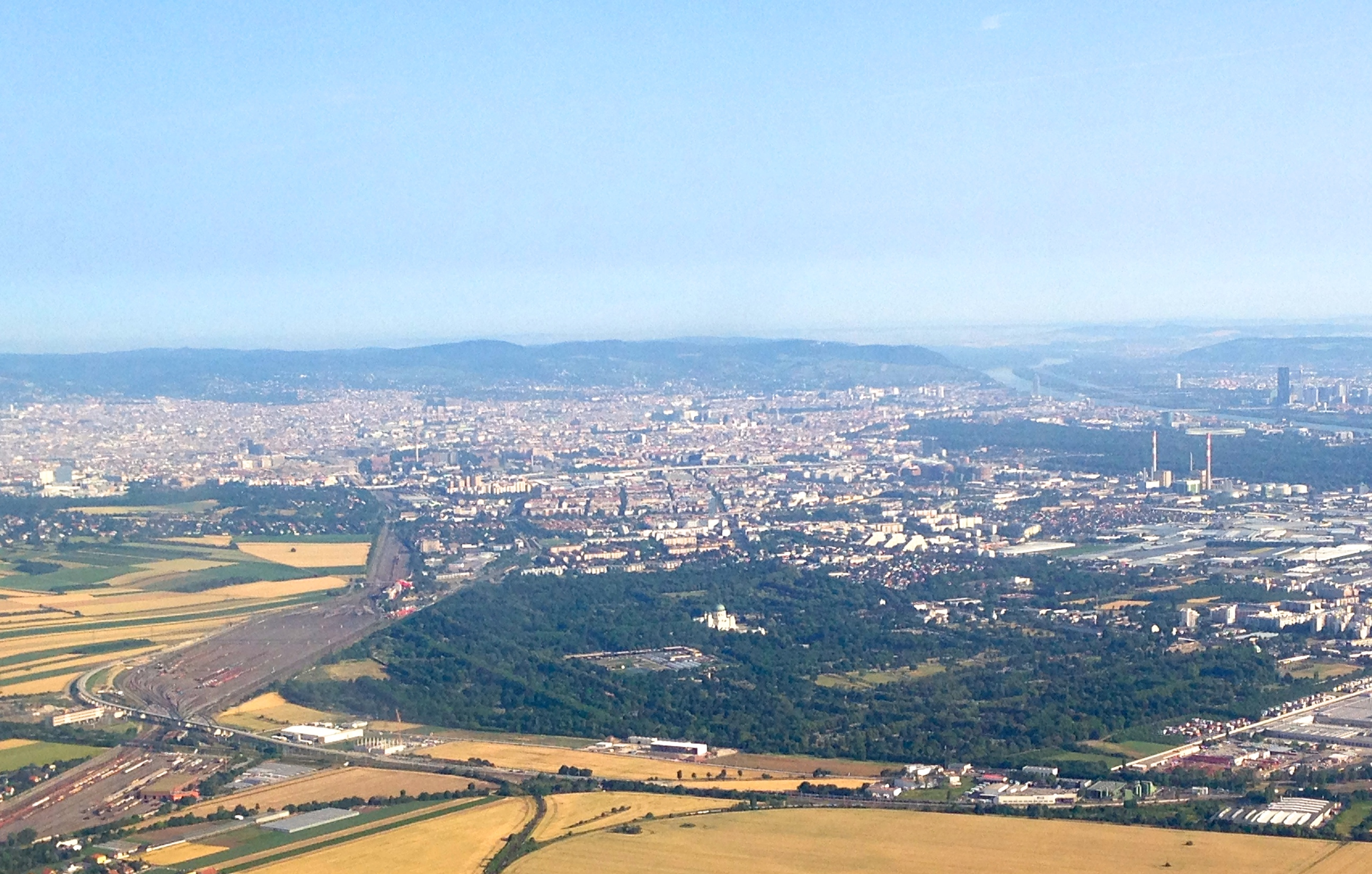 Vienna Aerial Central Friedhof